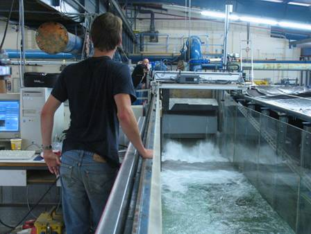 Ethohydraulik: wasserbauliche Laborrinne